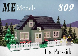 ME Models Set 809